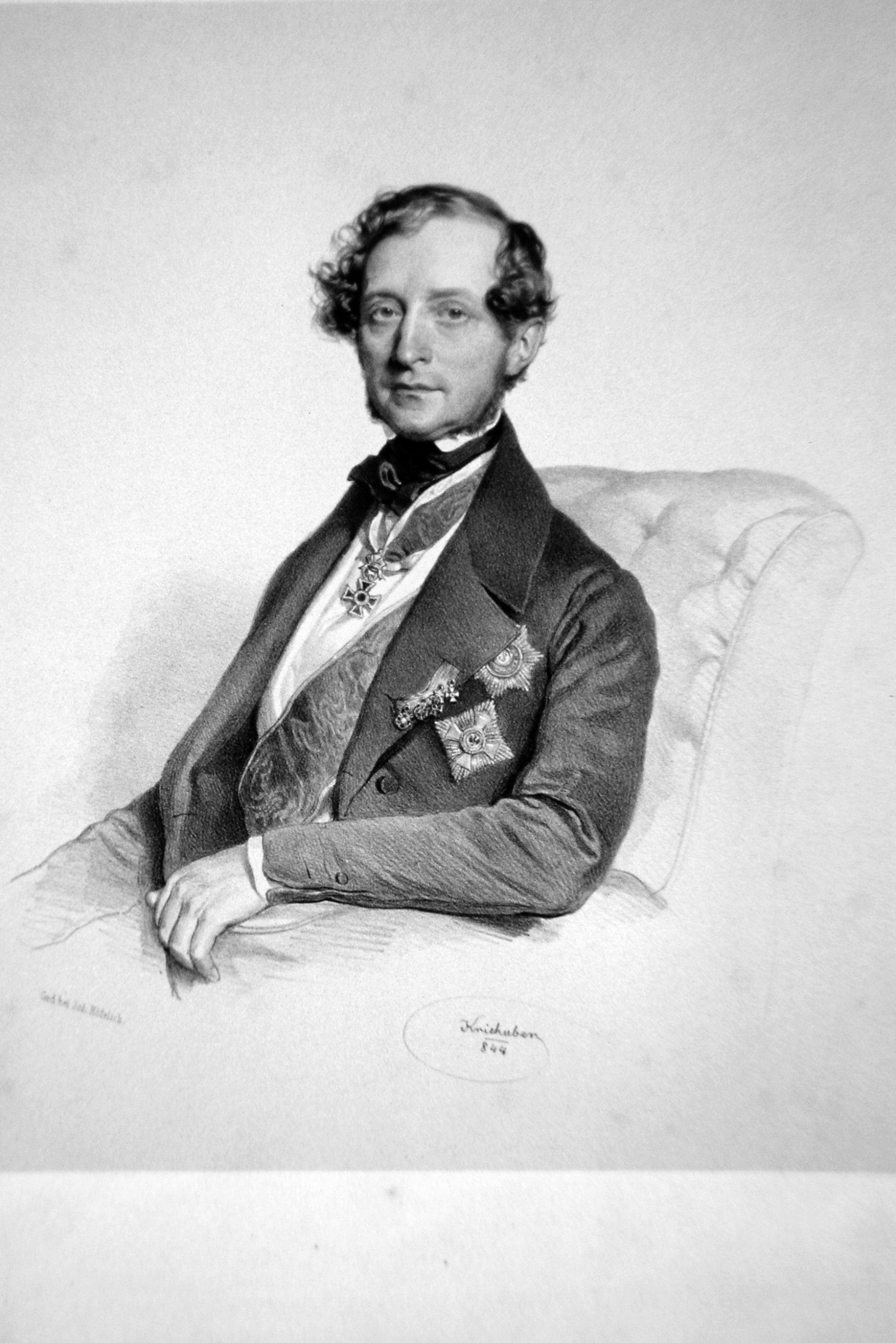 Ludwig Graf Tengoborski (1793-1857), russischer Diplomat. Lithographie von Josef Kriehuber, 1844